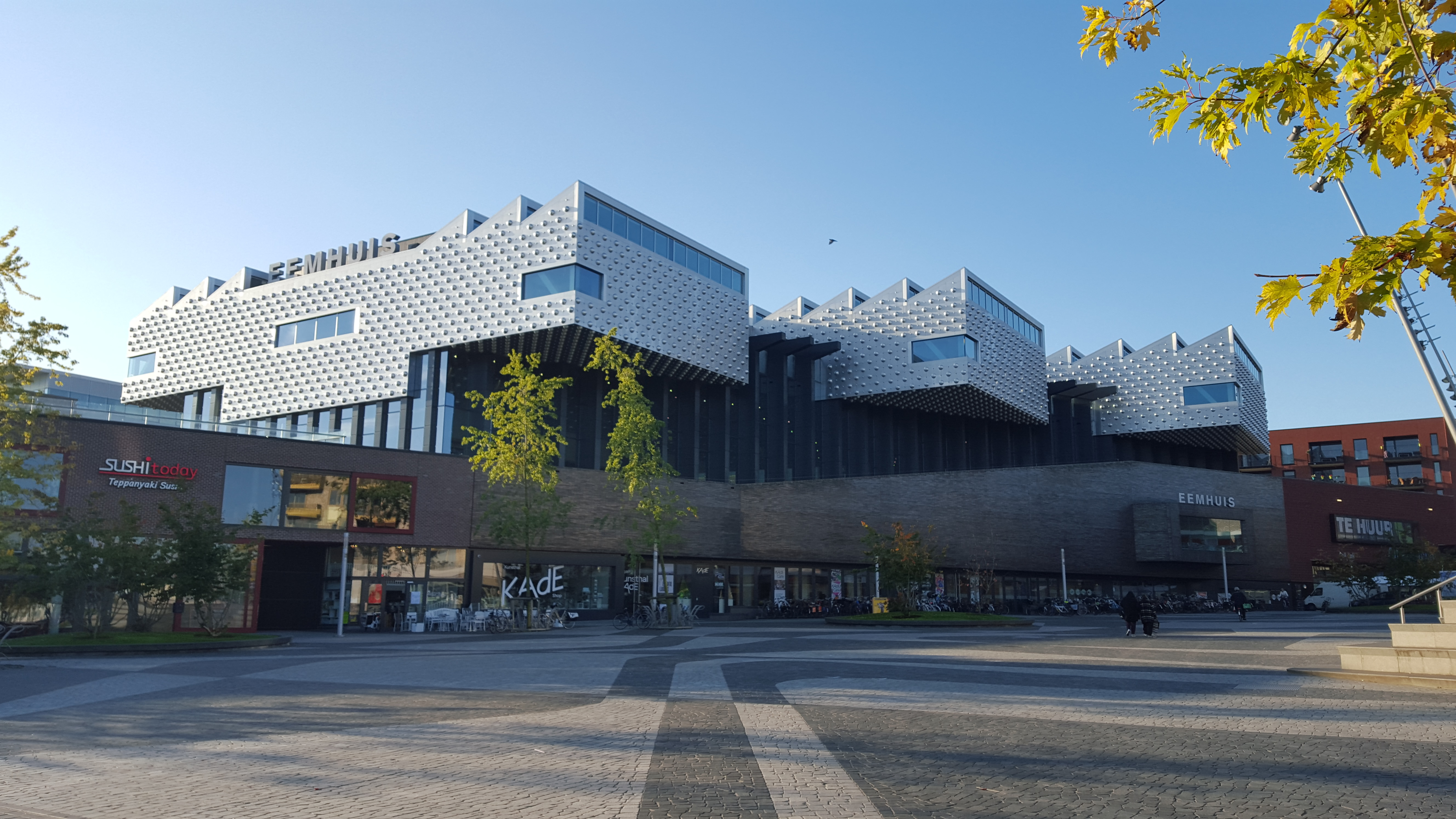 Wiki Loves Eemland in het Eemhuis, Amersfoort, Nederland